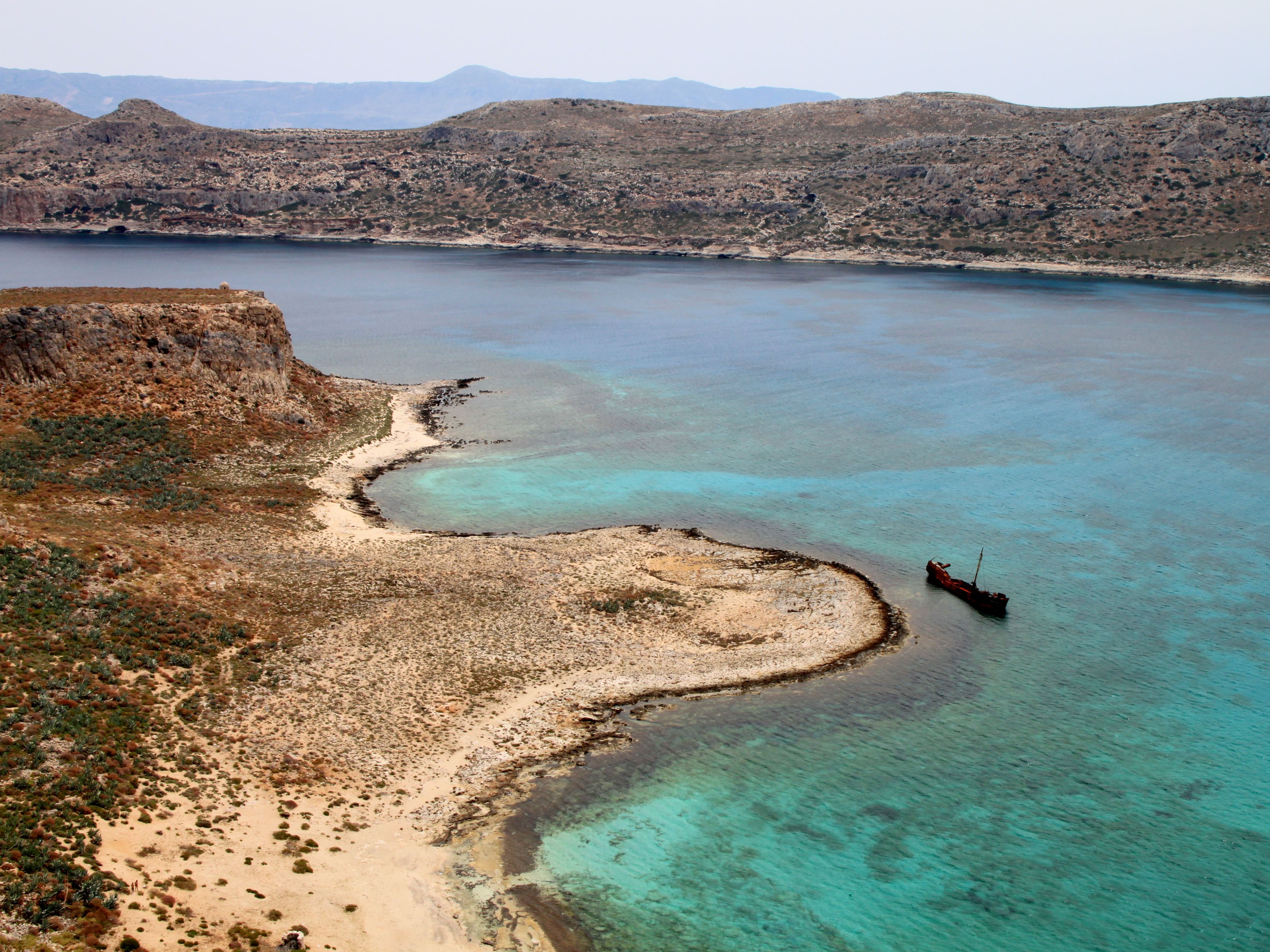 Südküste von Imeri Gramvousa (Ήμερη Γραμβούσα), Insel in der Gemeinde Kissamos, Präfektur Chania, Kreta, Griechenland